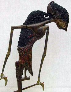 Dewi Anjasmara aus den Damarwulan-Erzählungen, Wayang Klitik aus Ostjava, ca. 1910. / Dewi Anjasmara aus den Damarwulan-Erzählungen, Wayang Klitik aus Ostjava, ca. 1910.